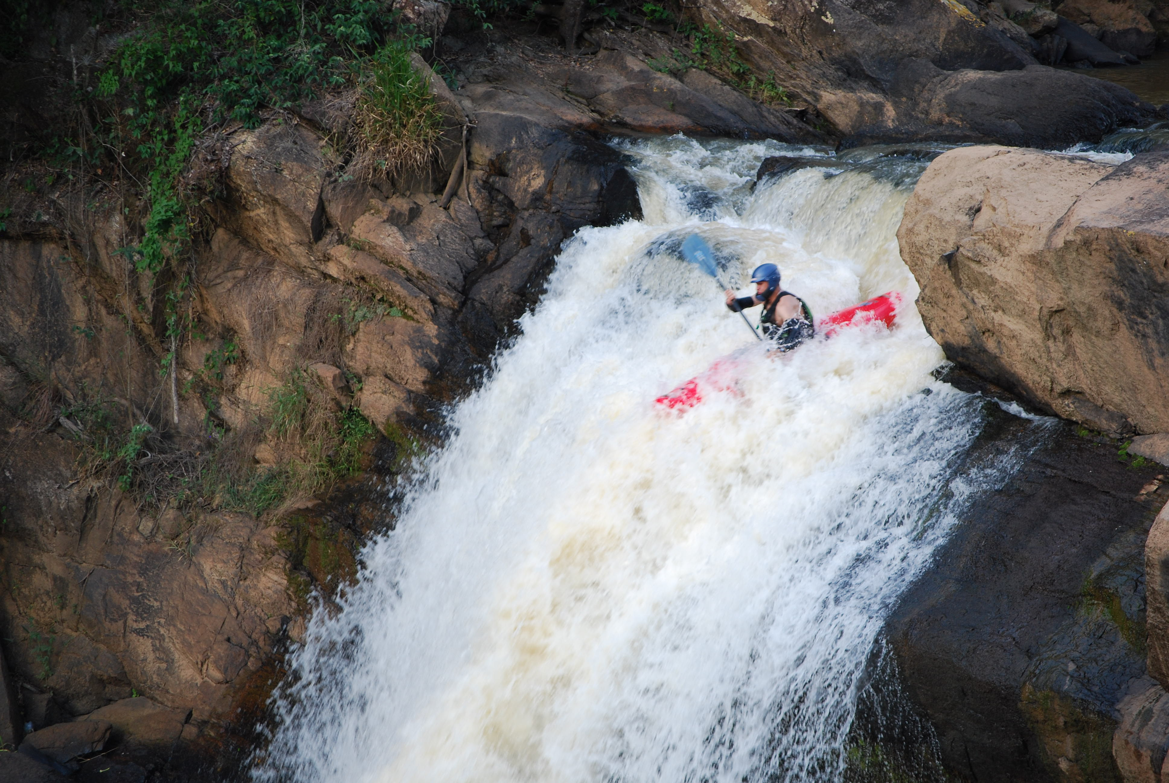 Cachoeira do Falcão, em Monte Alegre do Sul - SP, e no momento do clique um caiaque atreveu-se a descê-la